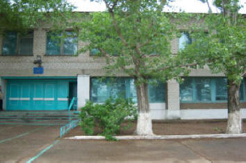 Побединская средняя школа. Посёлок Победа Быковского района Волгоградской области, Россия.